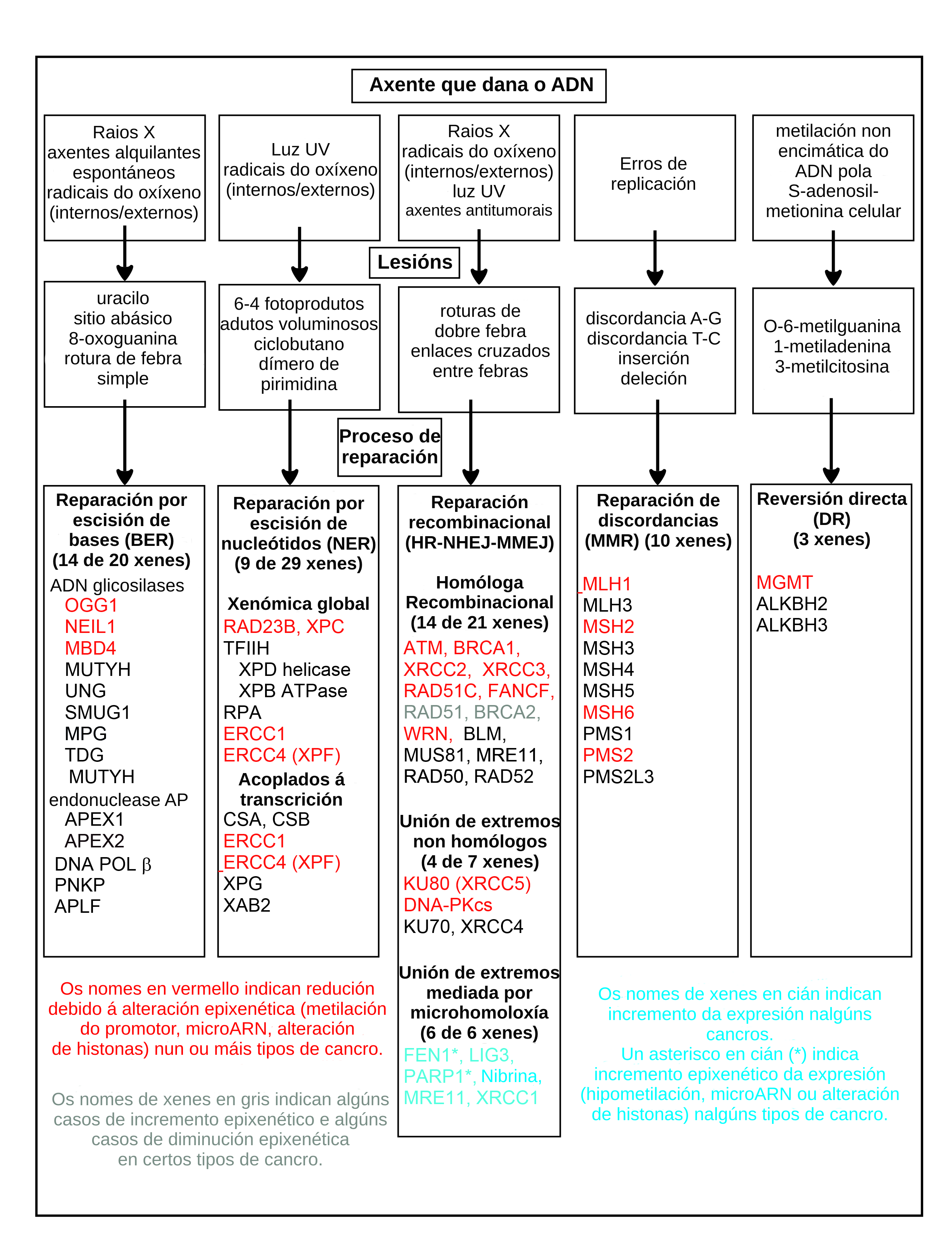 Axentes que danan o ADN, lesións que producen e vías de reparación en cancros.